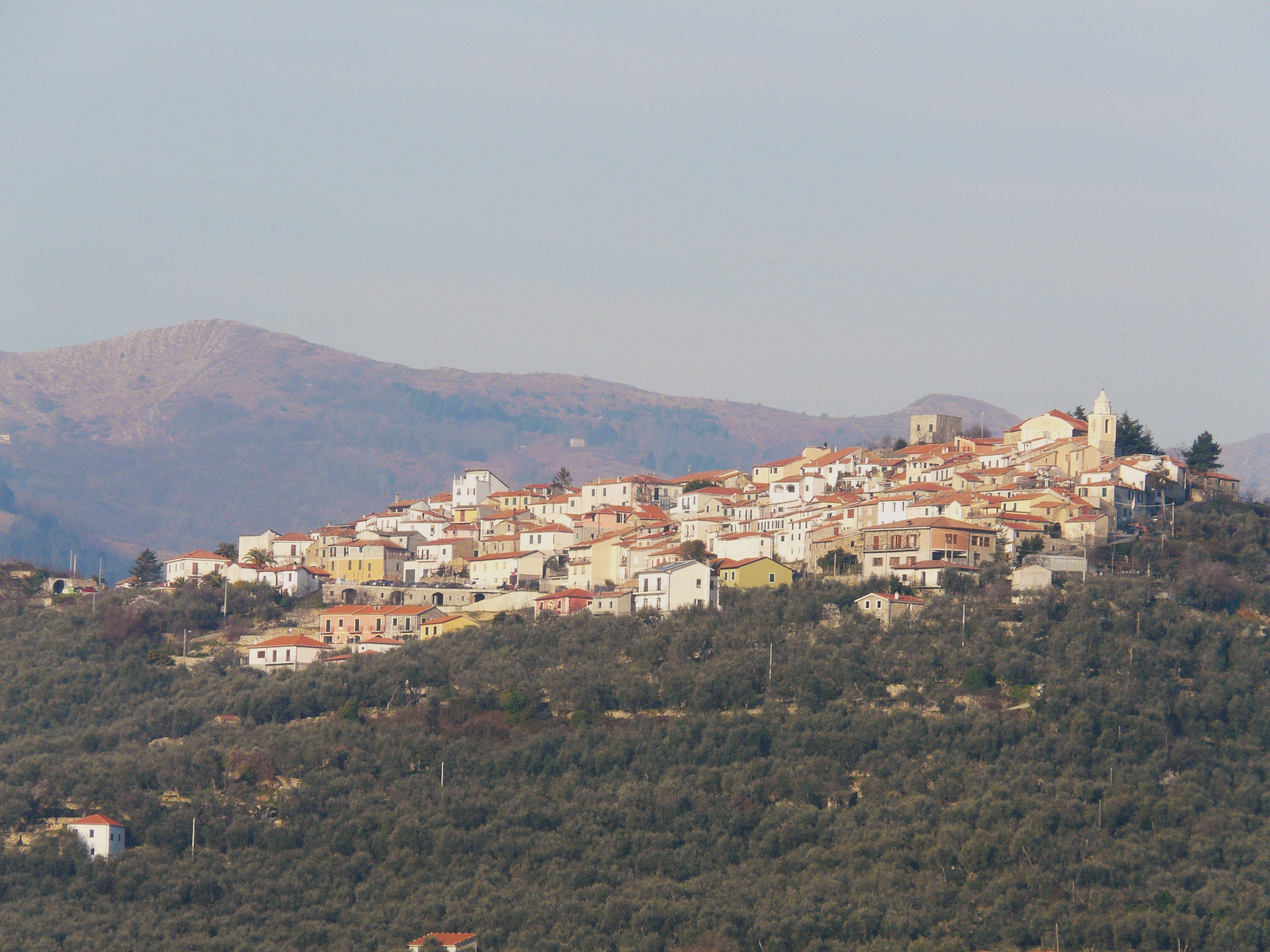 Lucinasco, Liguria, Italia